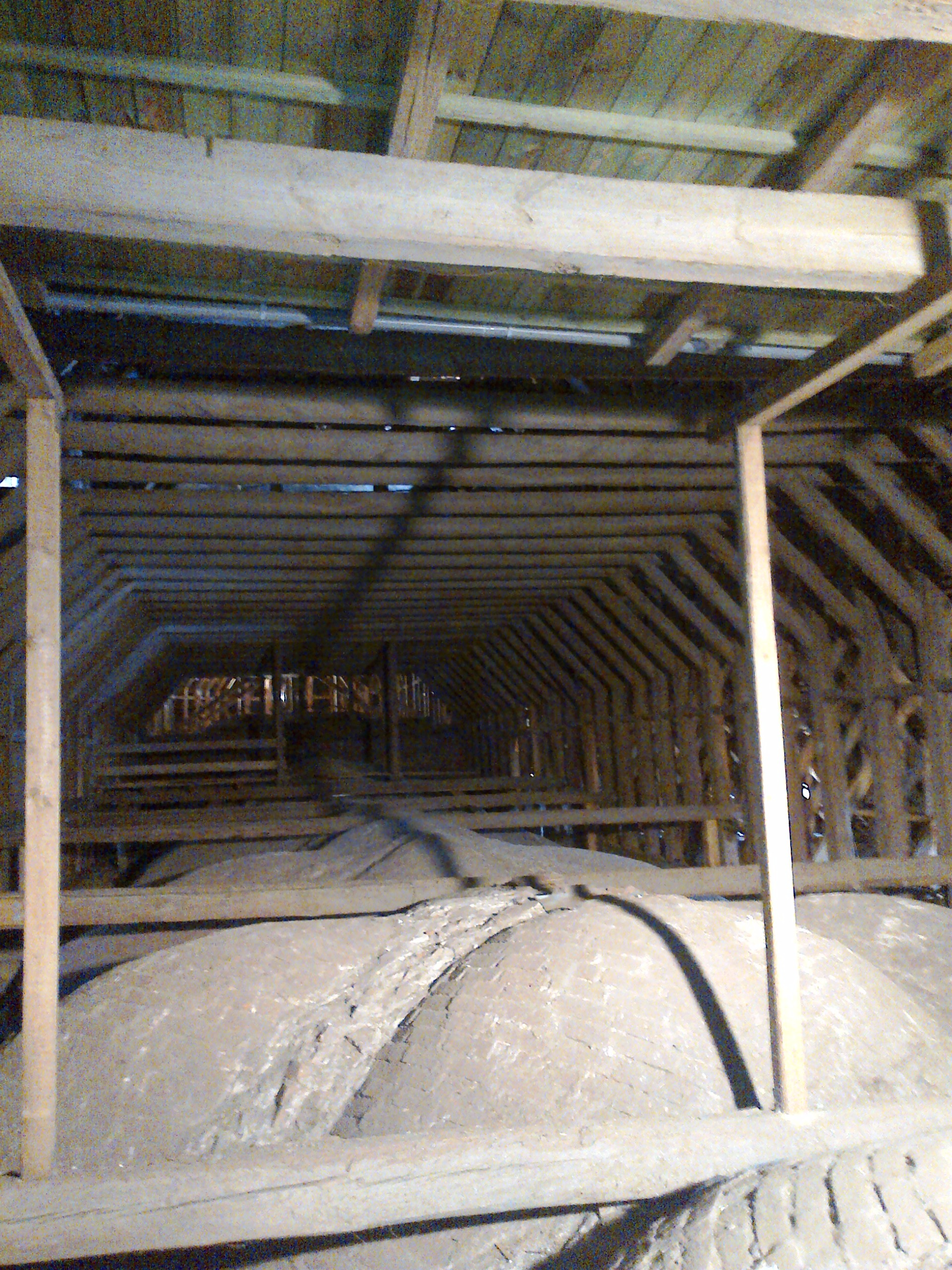 Tangermünde Kirche St.Stephan, Blick auf das Kreuzgewölbe und den Dachstuhl